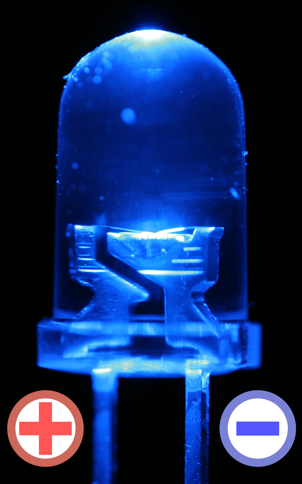 LED macro, blue.